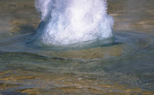 Ausbruch eines Geysirs (4/6) Forograf: Andreas Tille